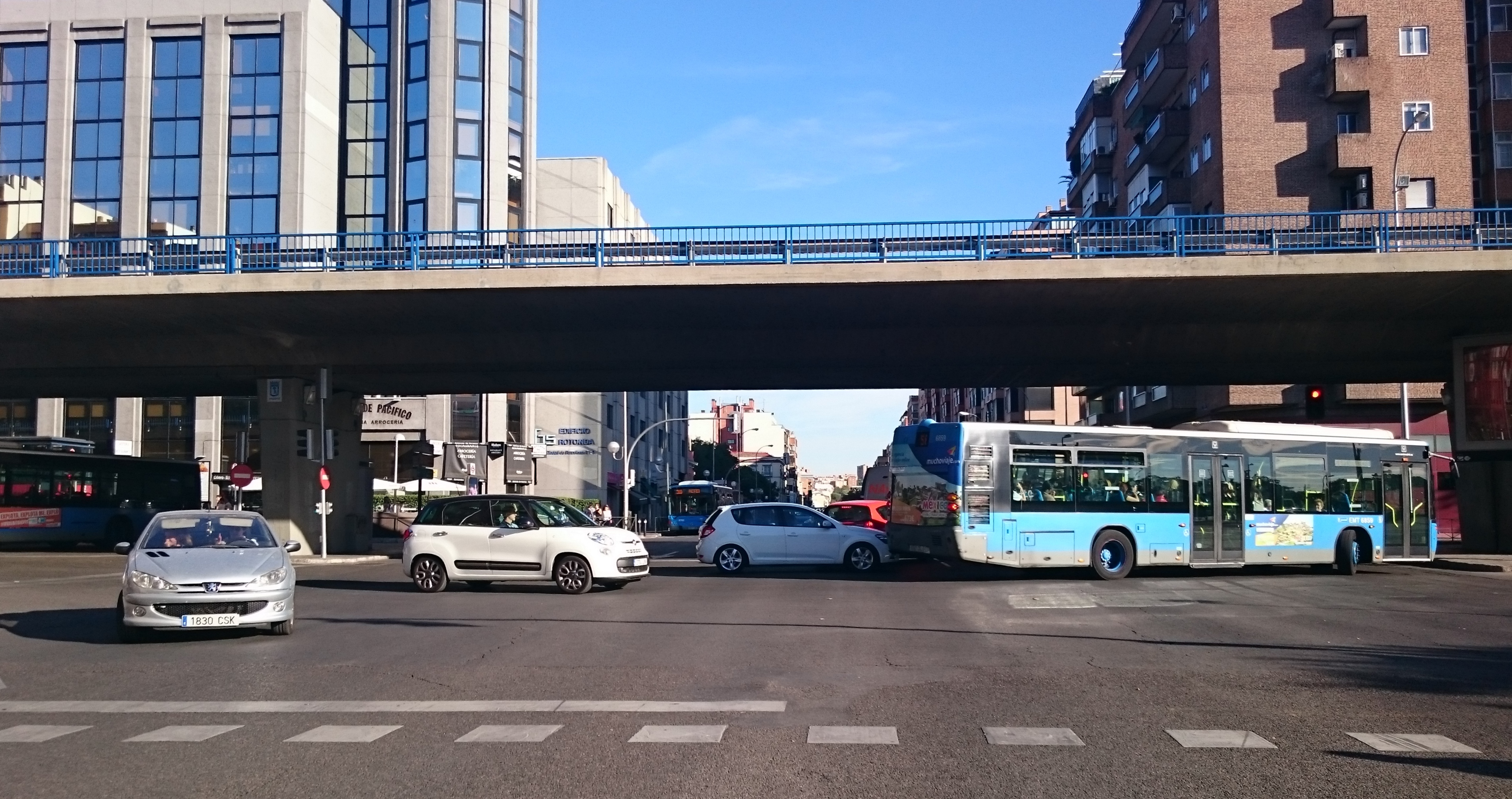 Vista de la Avenida Ciudad de Barcelona hacia el sur, en el cruce con el paso elevado por el que discurre la calle Doctor Esquerdo (izquierda) y Pedro Bosch (derecha)